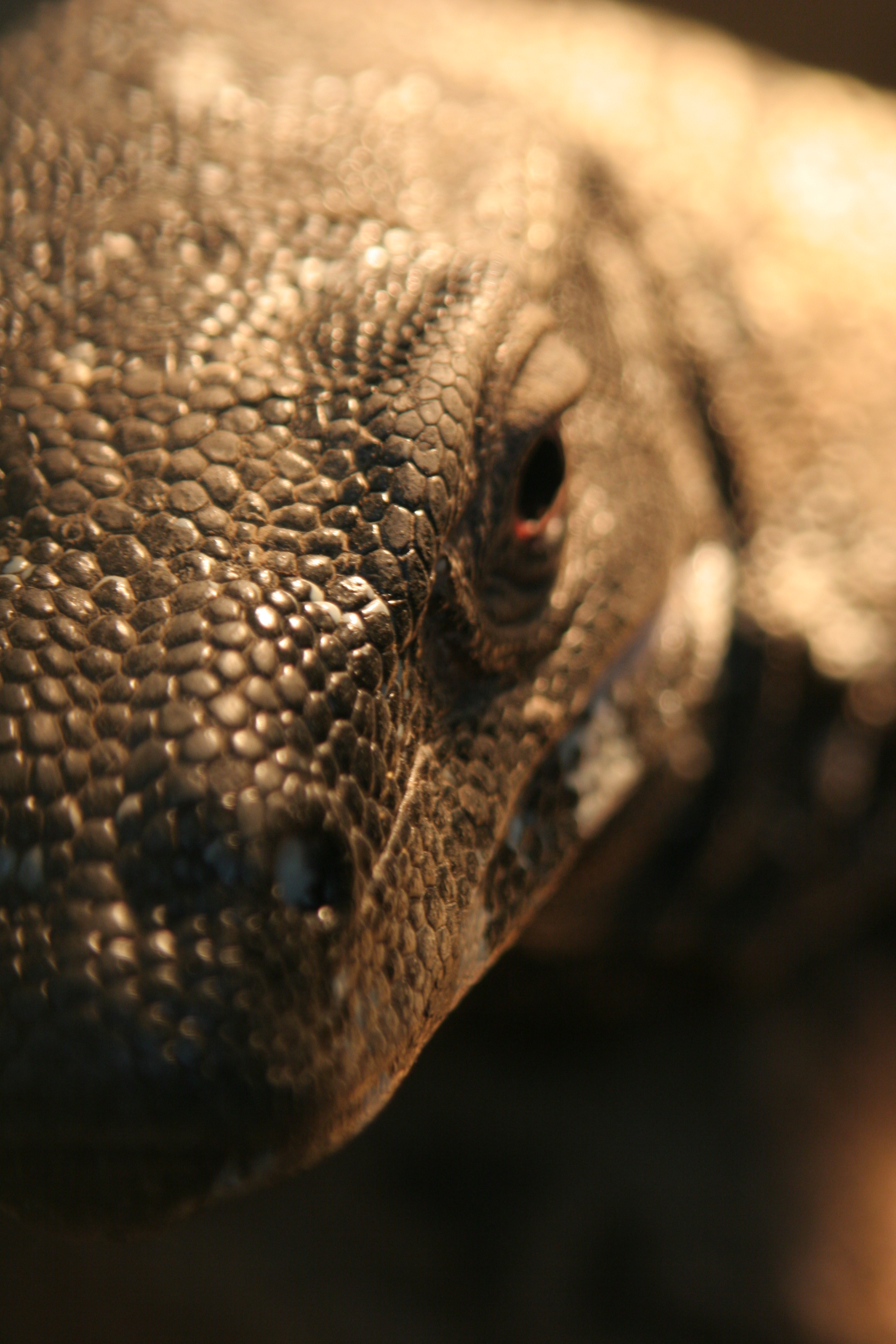 Komodo dragon